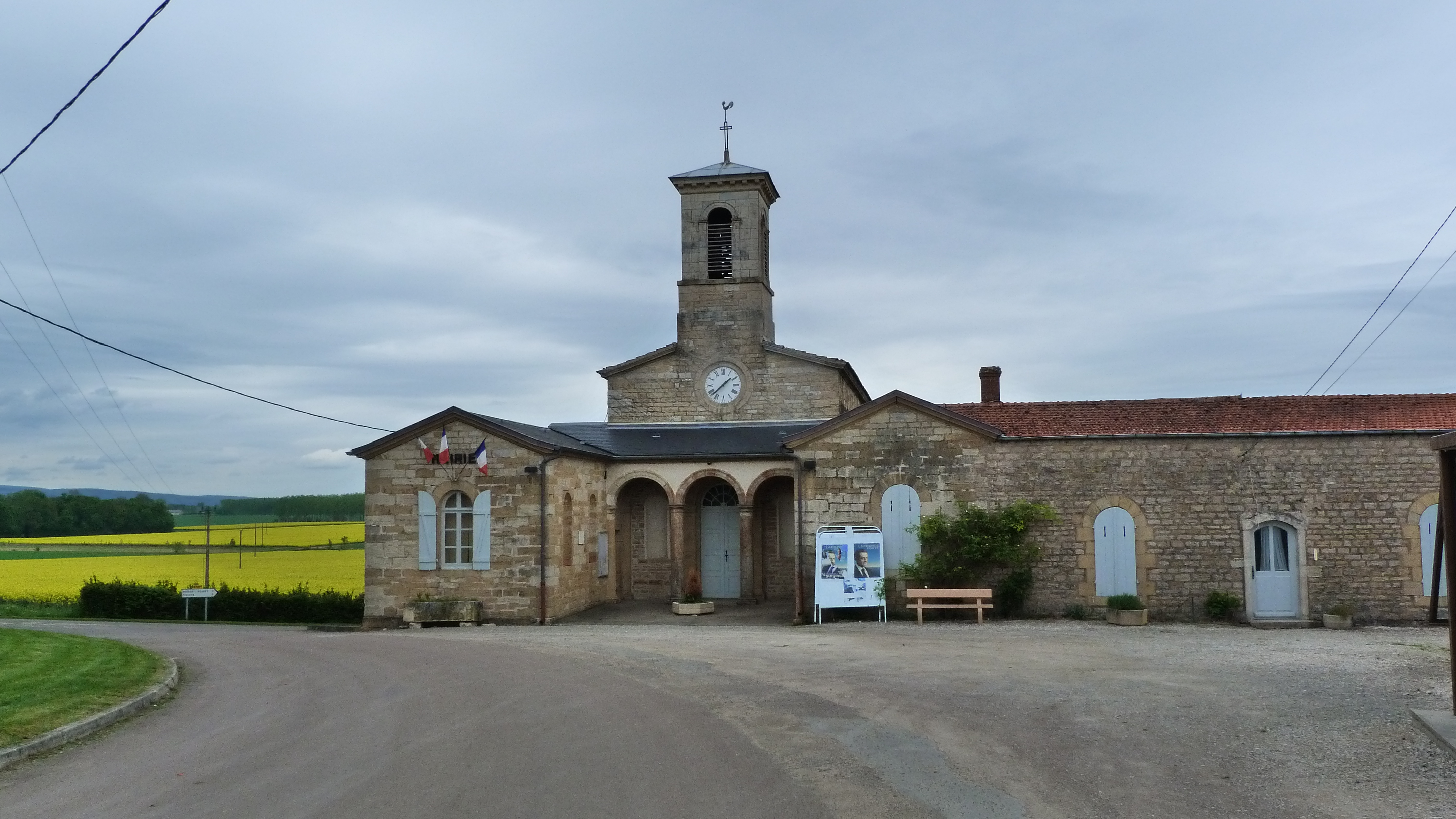 Mairie de Broindon